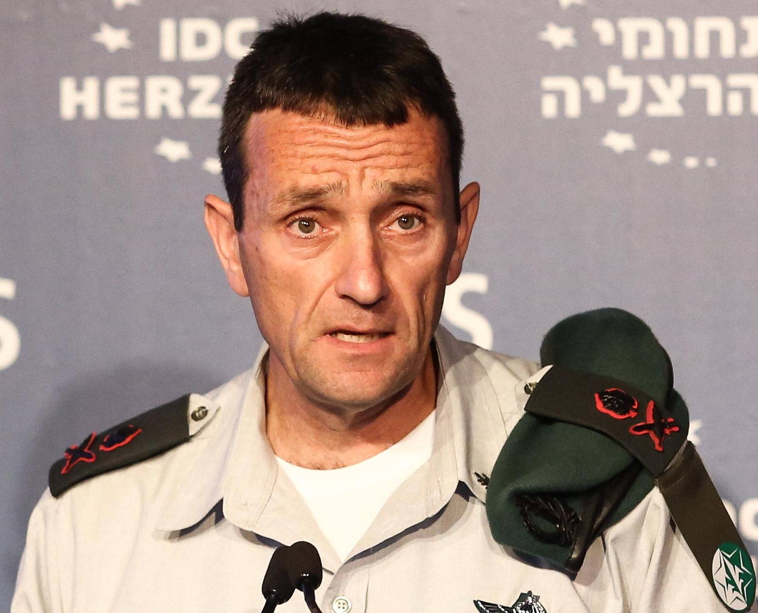 אלוף הרצי הלוי בכנס הרצליה 2016 של המכון למדיניות ואסטרטגיה במרכז הבינתחומי הרצליה